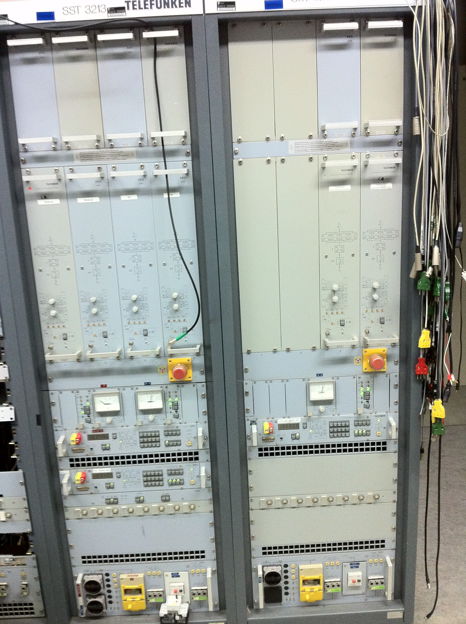 Analoge Sendeendstufen des Radiosenders "Schleptruper Egge"